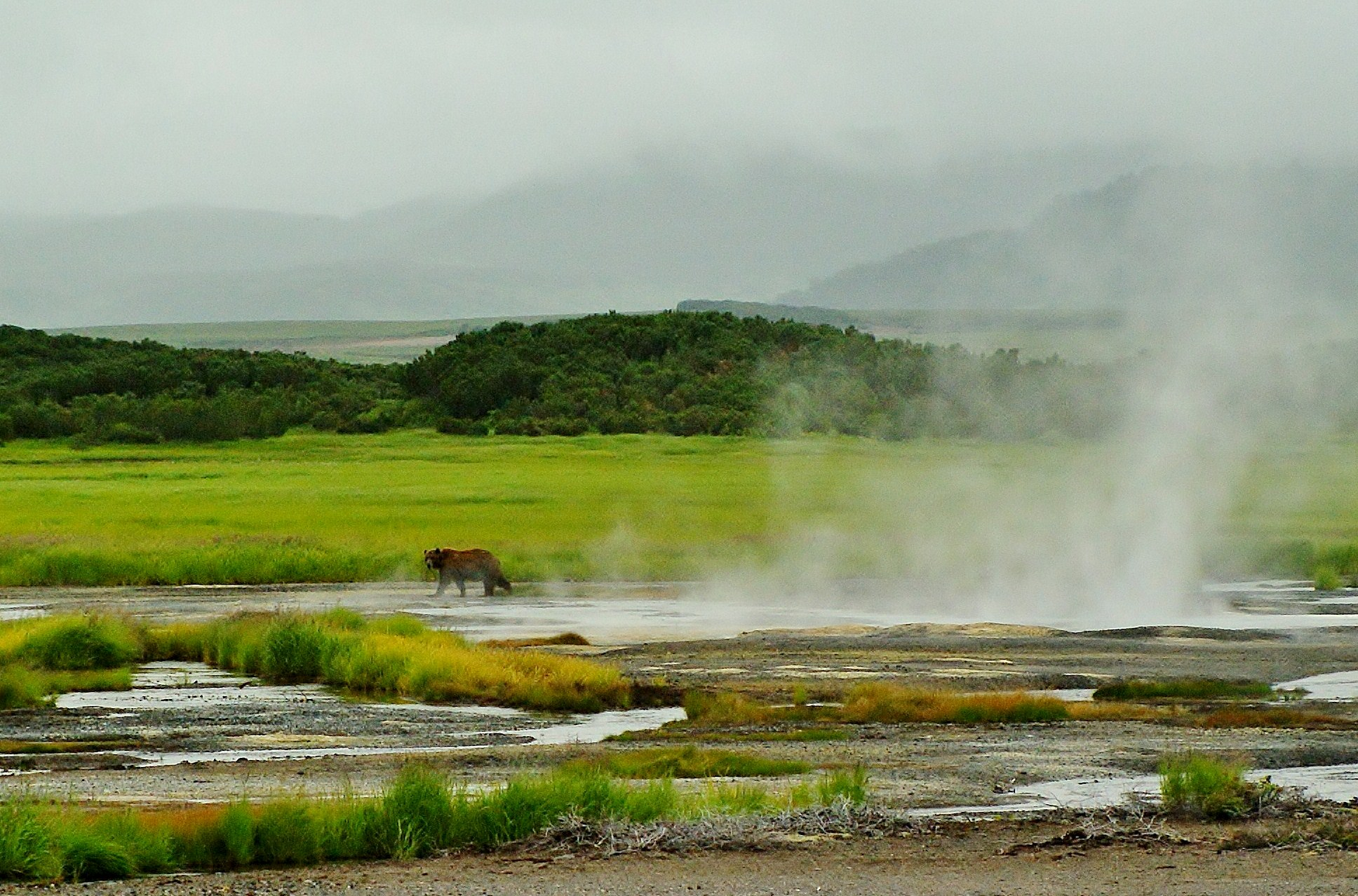 Молодой медведь на термальном поле. Узон. Кроноцкий заповедник. This image is related to the protected area of Russia number 4100034